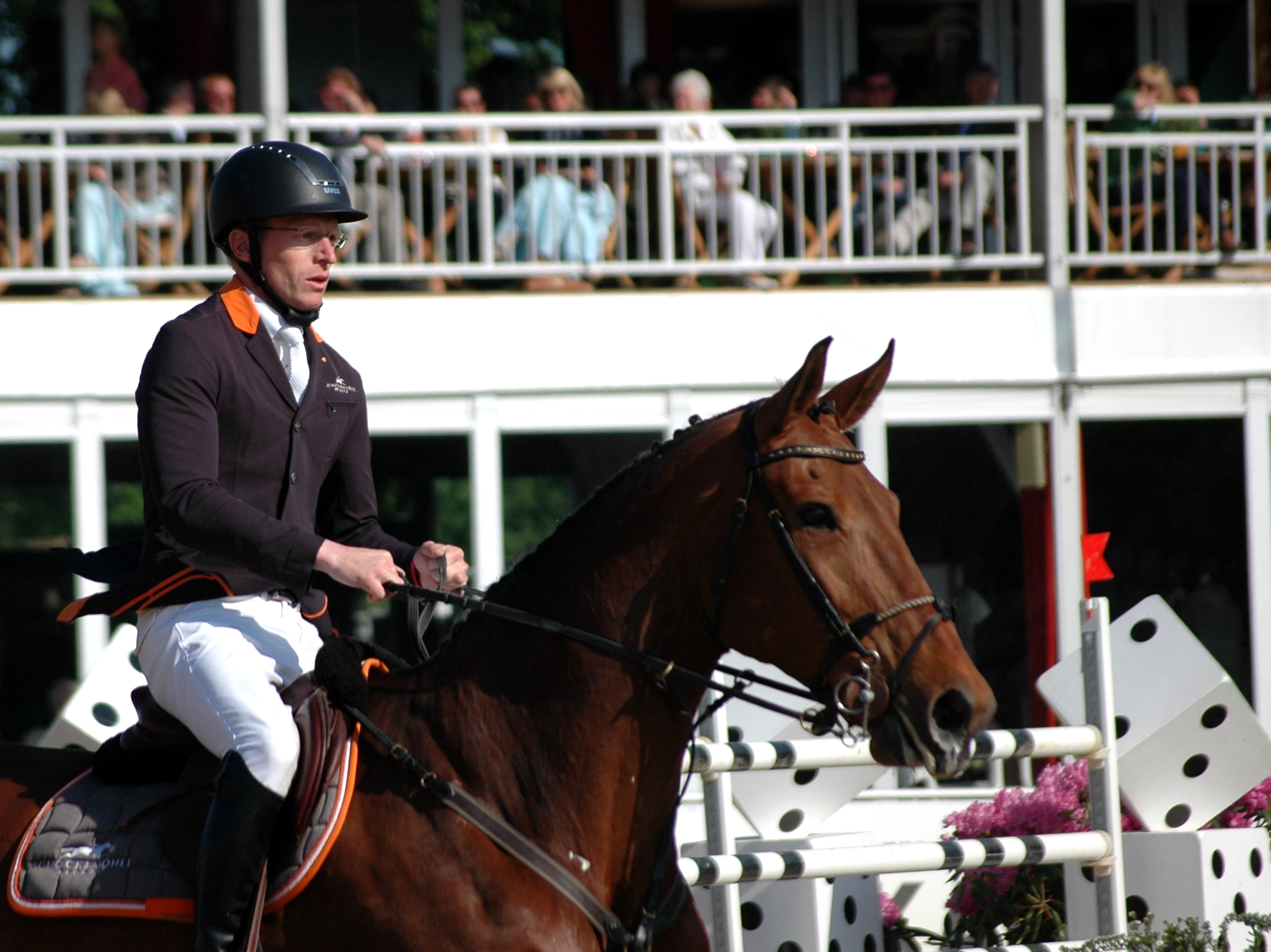 51. Maimarkt-Turnier